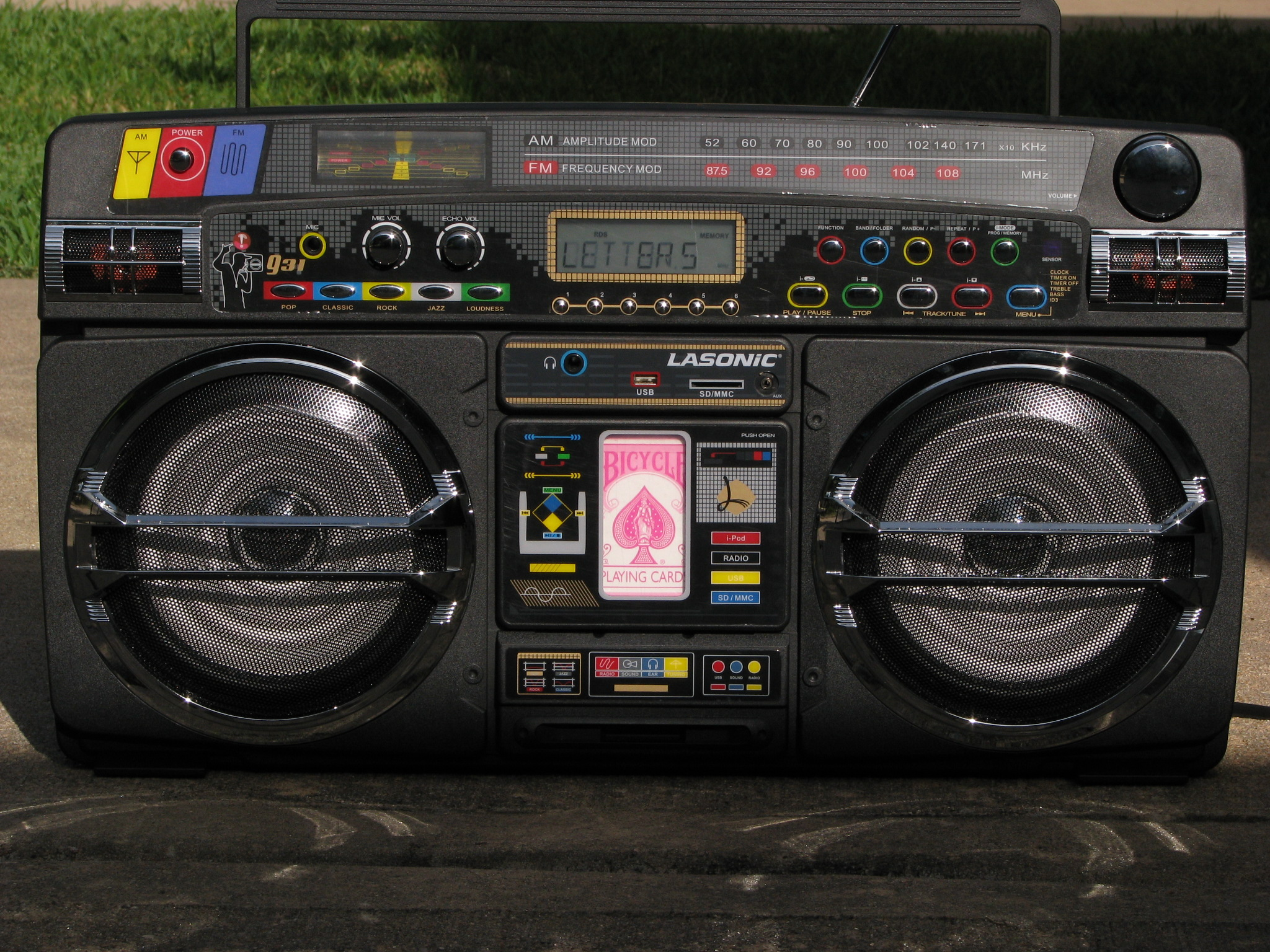 LASONiC i931 iPod Ghetto Blaster